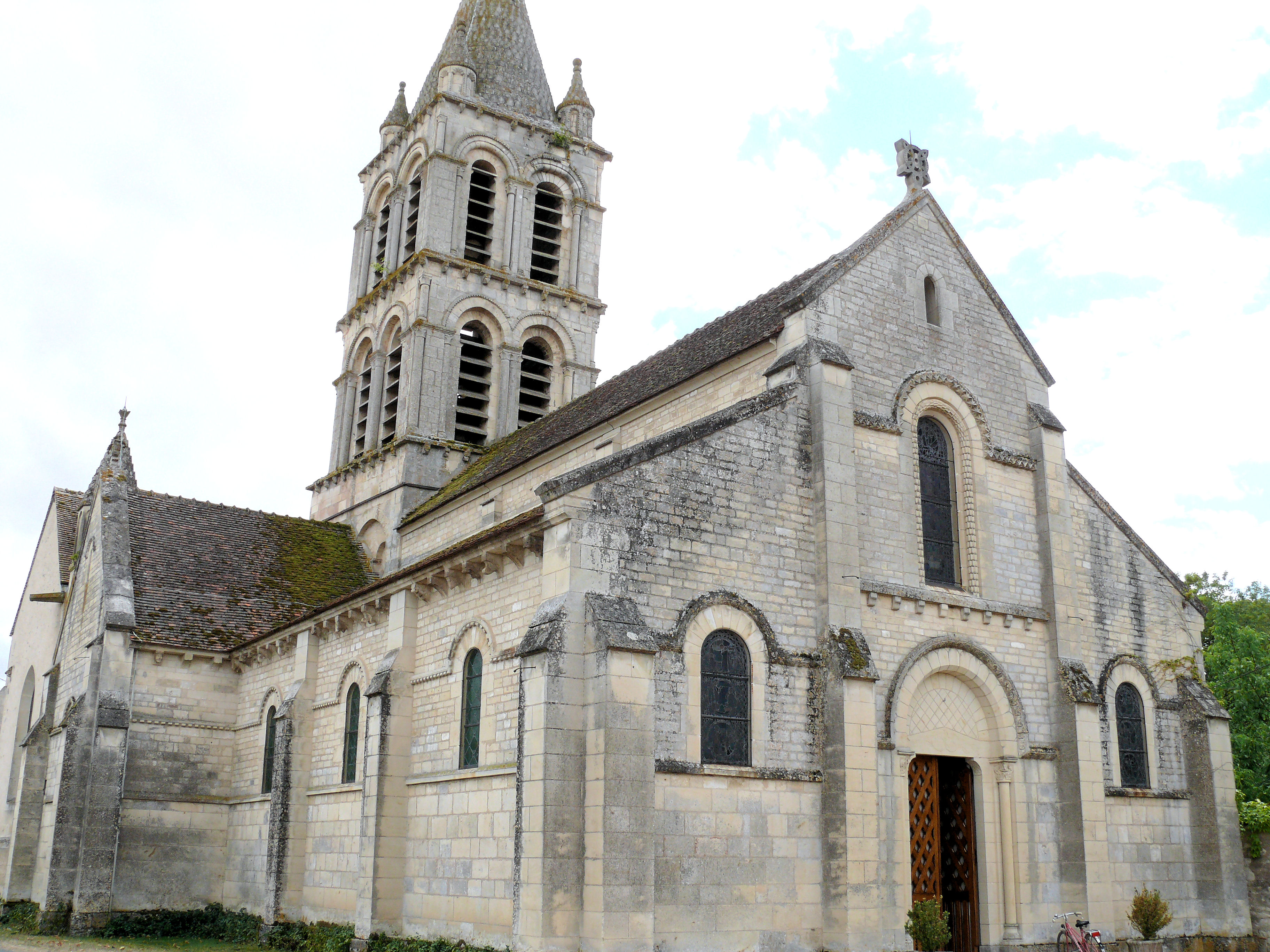 Charly - Eglise Notre-Dame - Ensemble